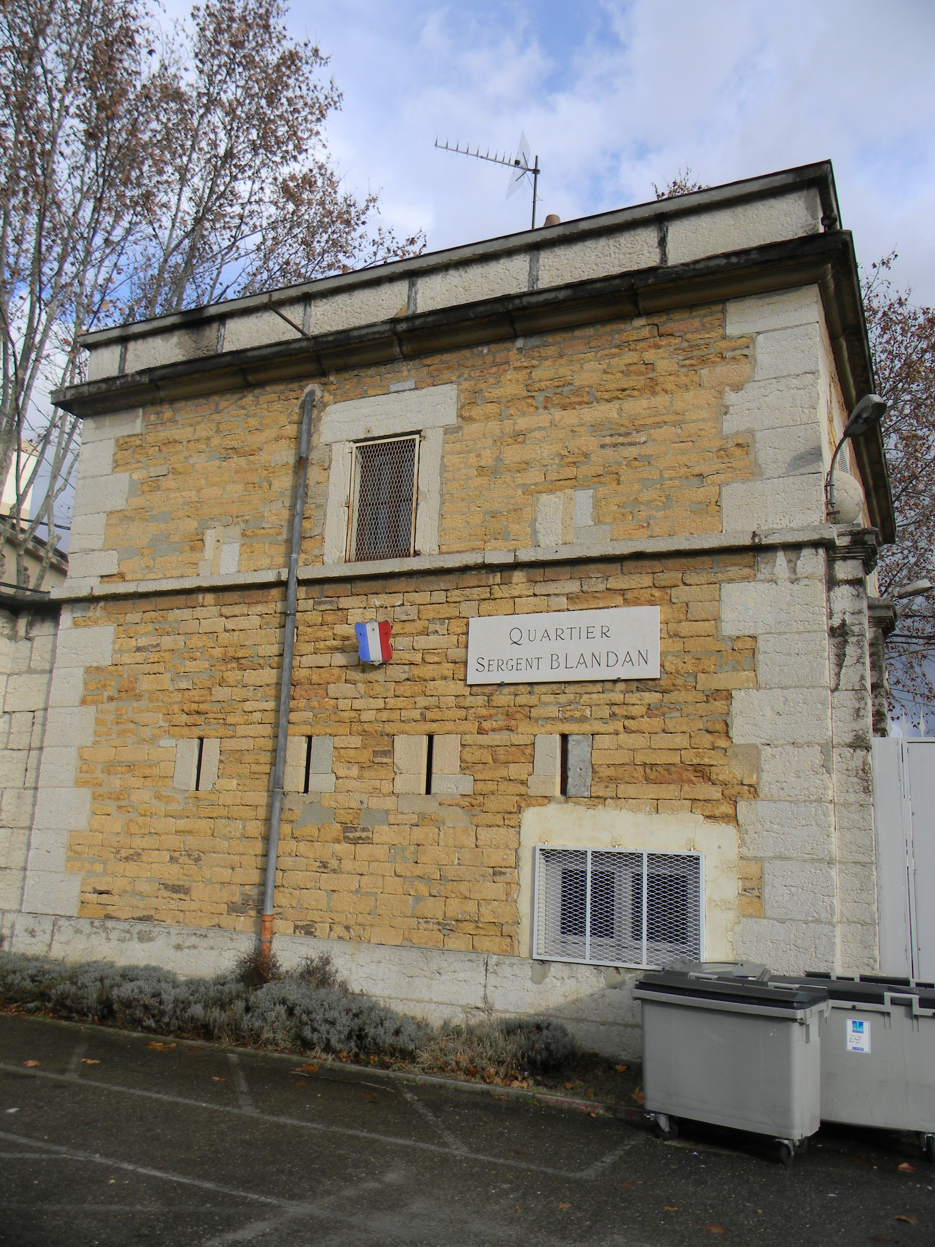 Bâtiment appartenant à l'ancien fort Lamothe à Lyon, portant la mention "Quartier Sergent Blandan", actuellement "Caserne Sergent Blandan".